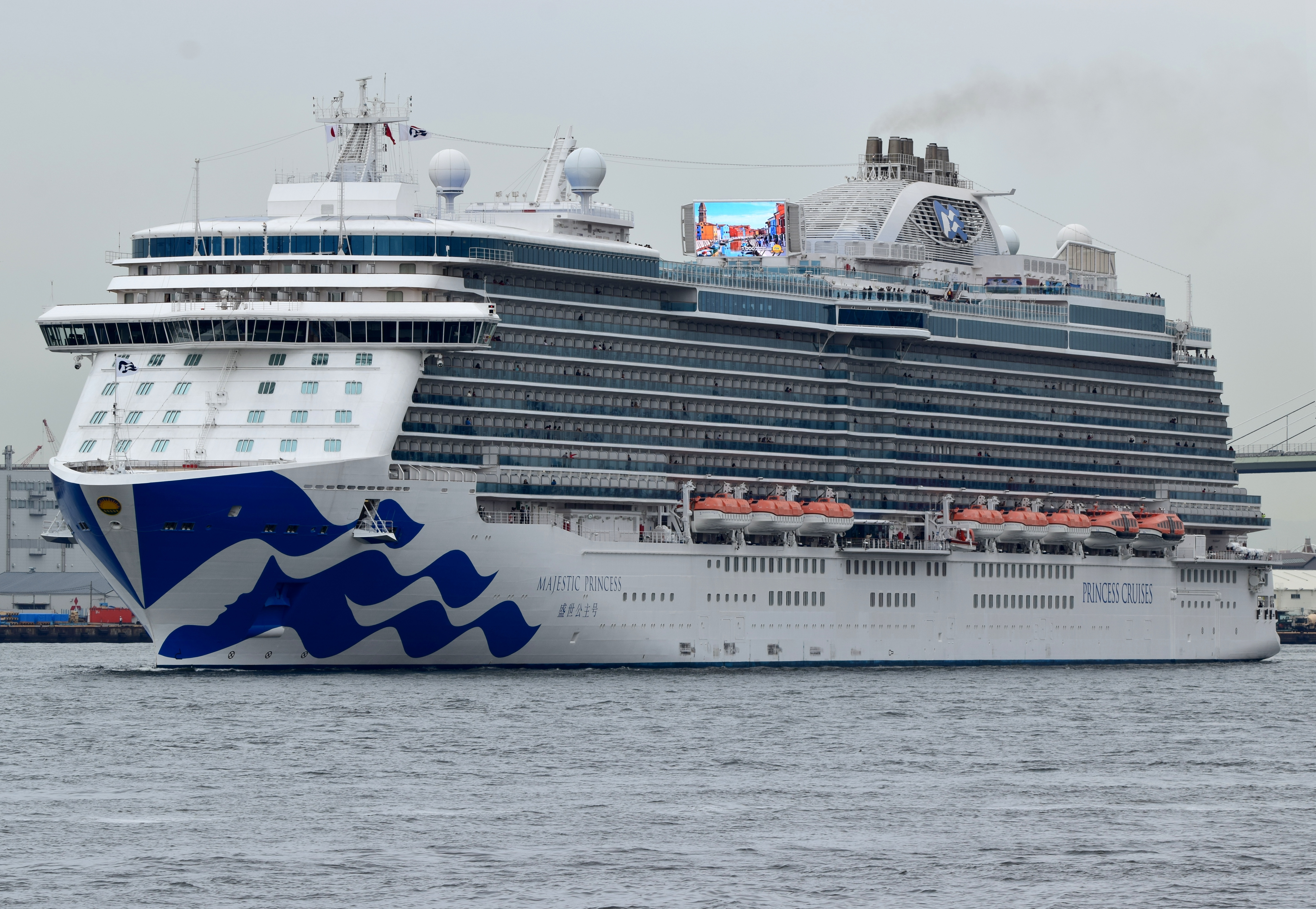 大阪天保山客船ターミナルから離岸するマジェスティック・プリンセス